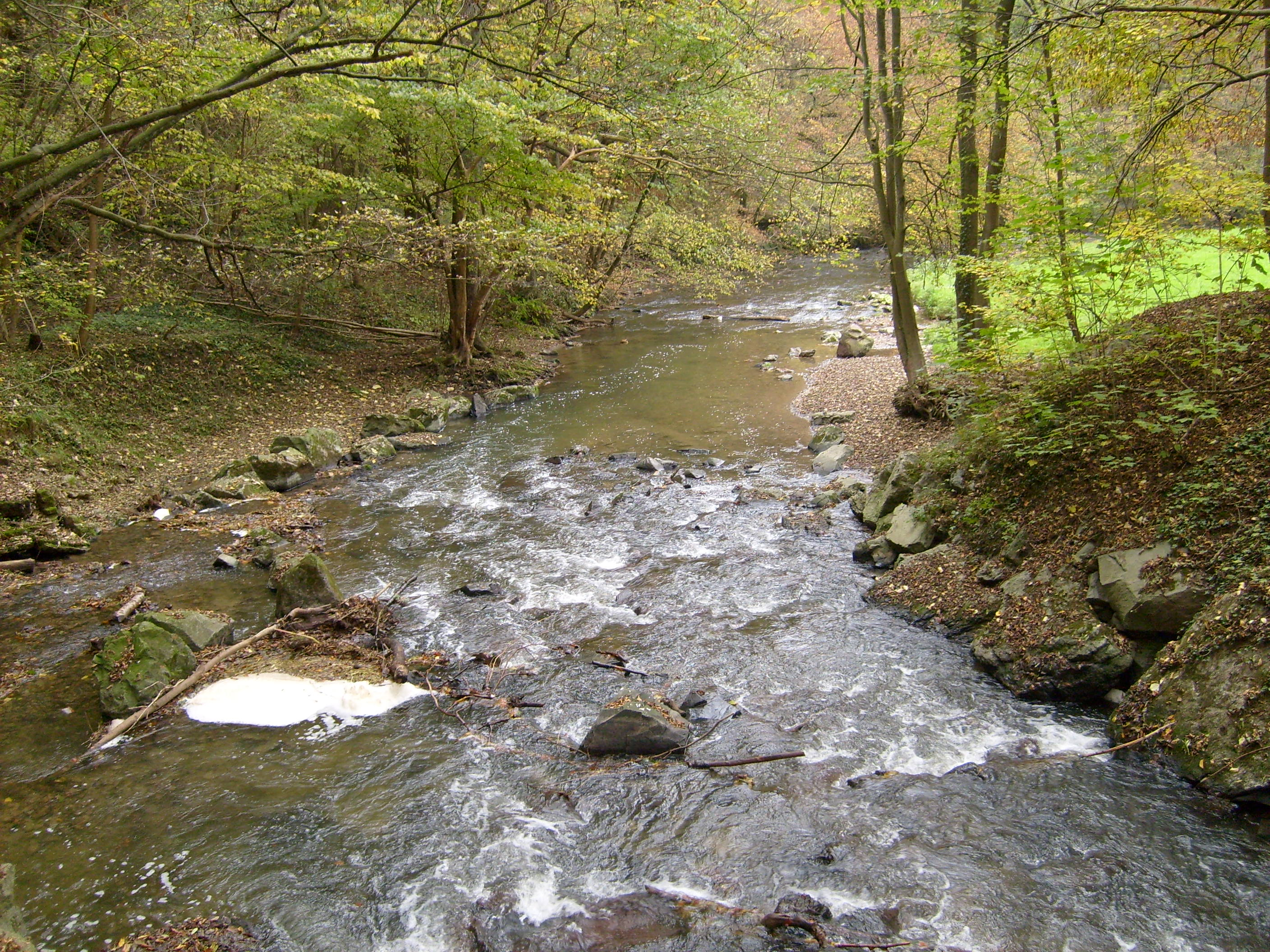 Die Düssel im Naturschutzgebiet „Westliches Neandertal“ in Erkrath. Fotografiert von der Braumüllerschen Düsselbrücke Richtung Erkrath